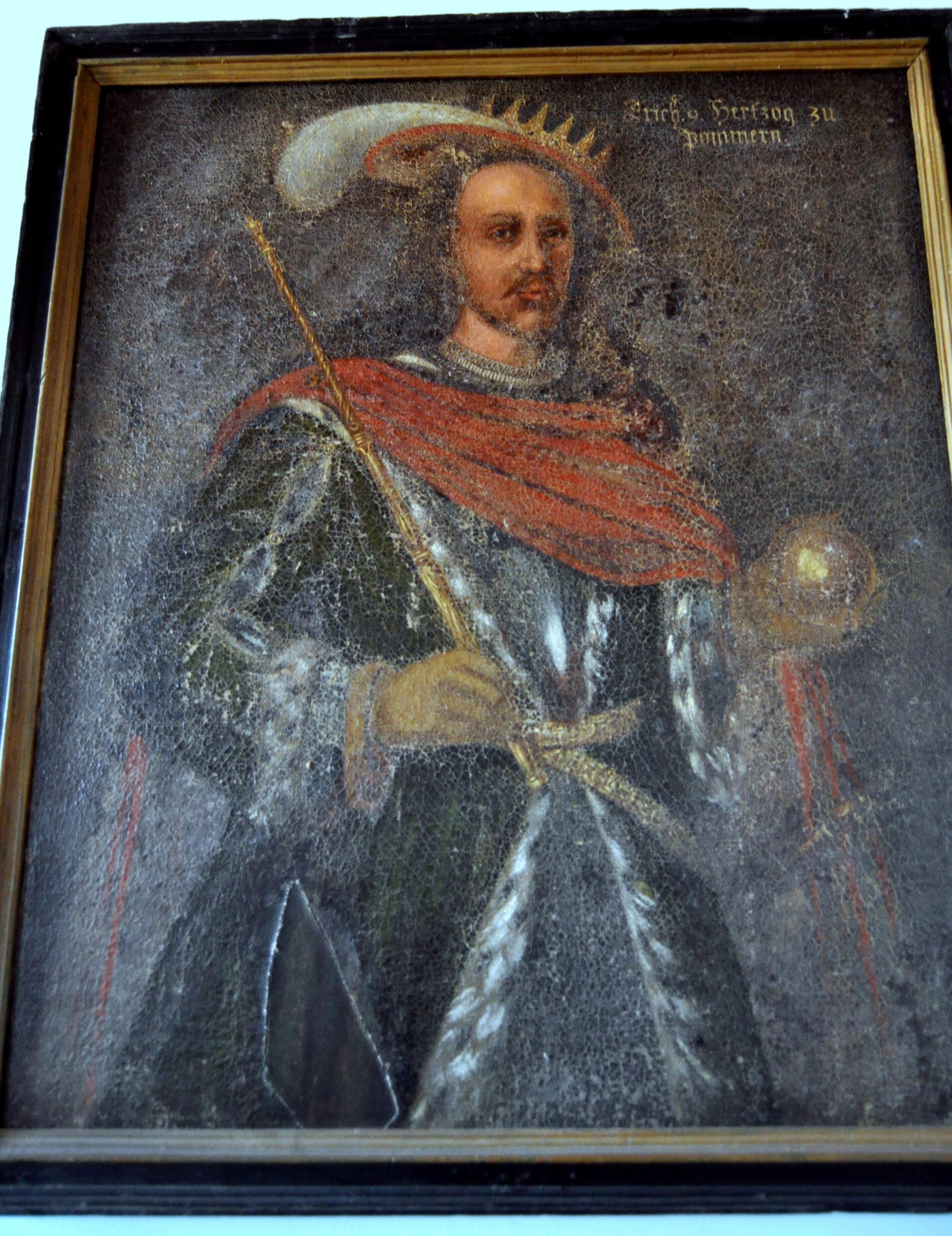 Erich I. von Pommern - als Erik VII. König von Dänemark - Gemälde in seinem Residenzschloß Nyborg